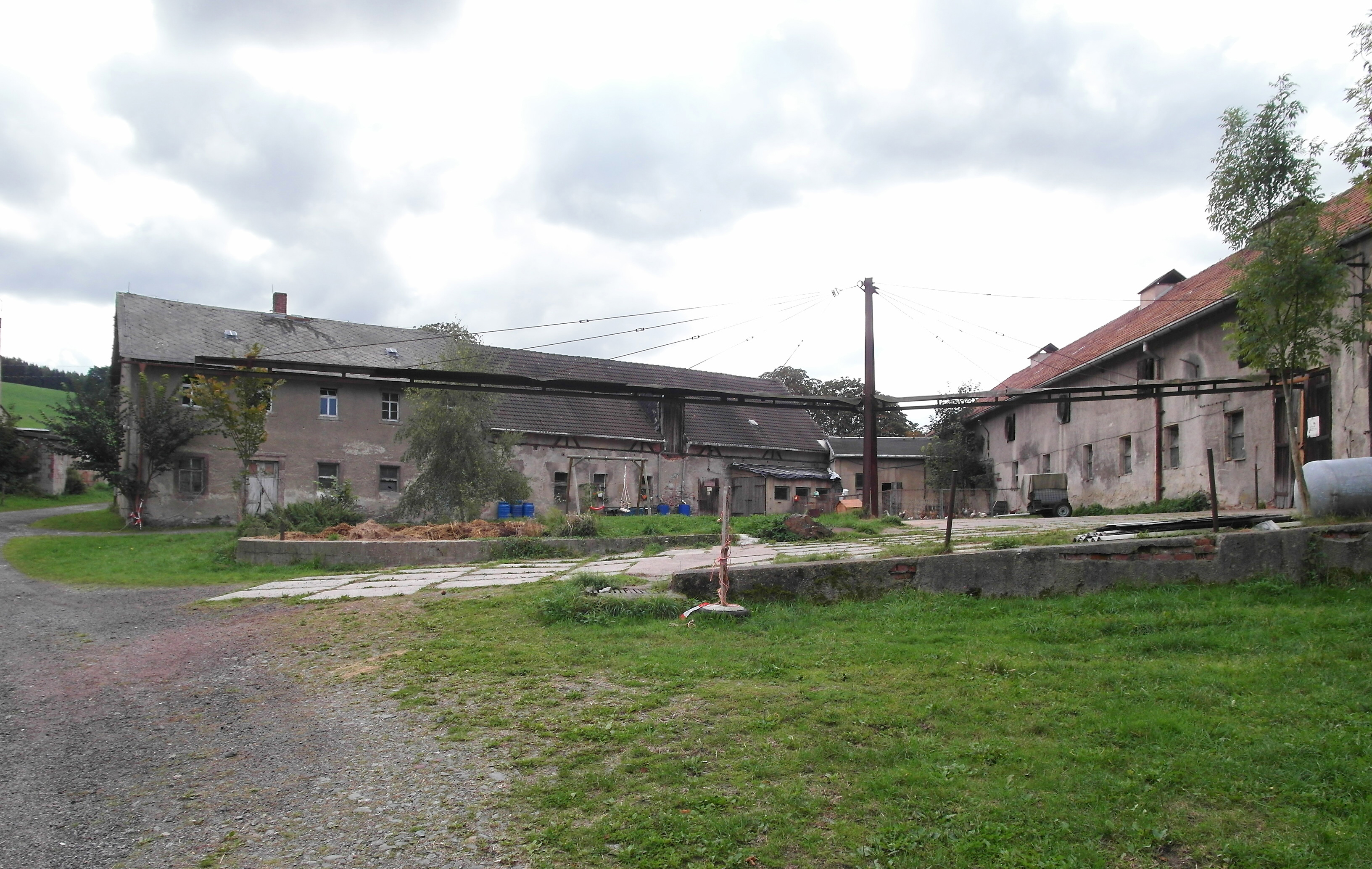 24.09.2015 09439 Dittersdorf (zu Amtsberg): Rittergut Dittersdorf, Hofweg 2-6. Der Gutshof, Hofweg 6 (GMP: 50.746892,12.984868). [SAM1779.JPG]20150924405DR.JPG(c)Blobelt